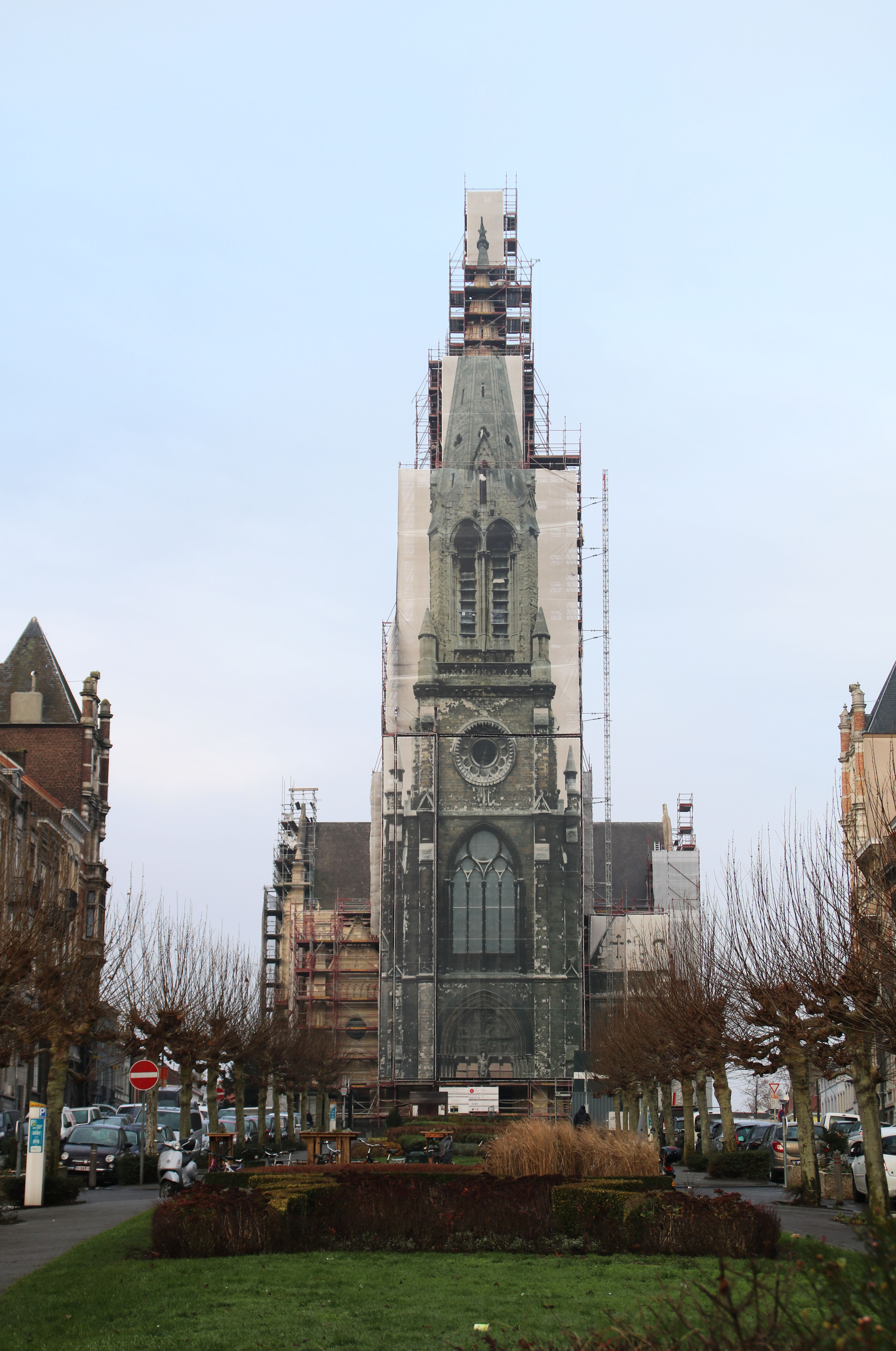 Eglise Saint Servais à Bruxelles.